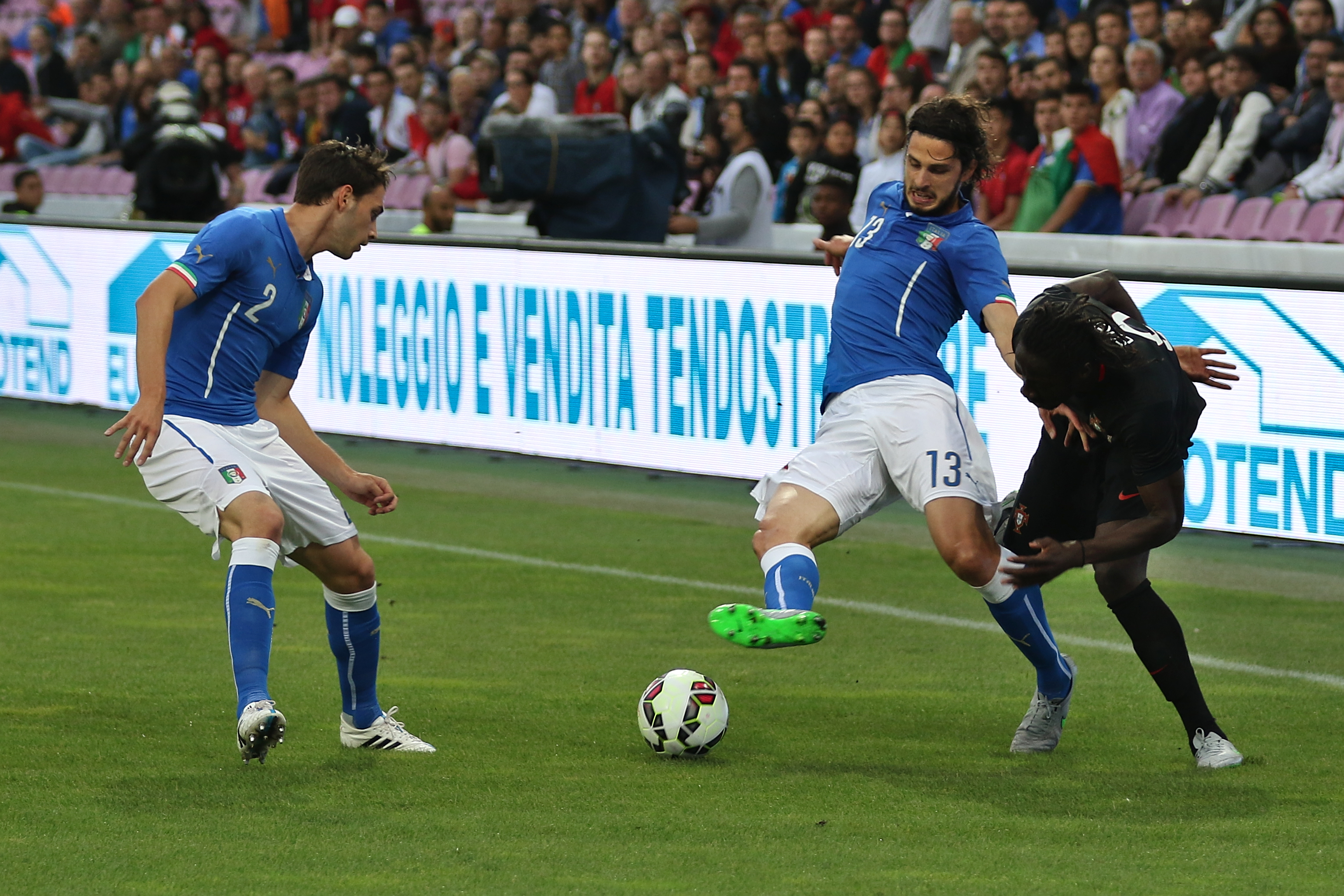 20150616 - Portugal - Italie - Genève - Mattia De Sciglio, Andrea Ranocchia et Eder